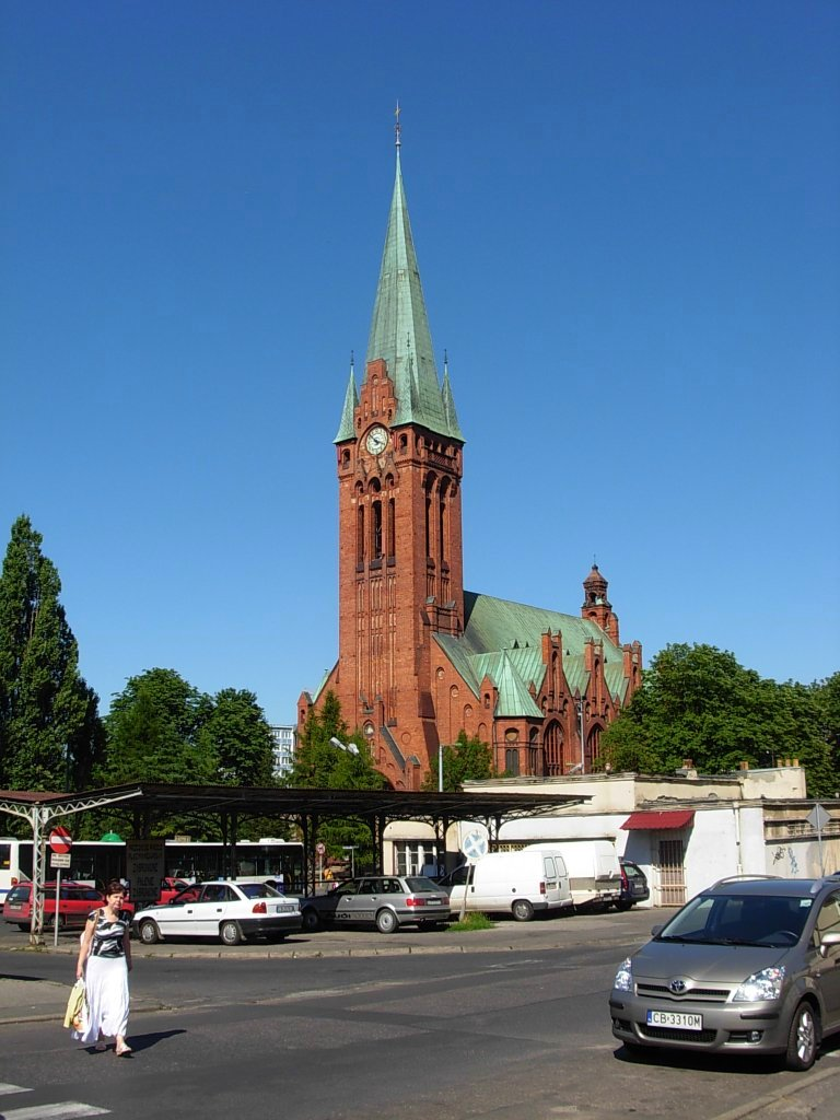 Kościół p.w. św. Andrzeja Boboli w Bydgoszczy